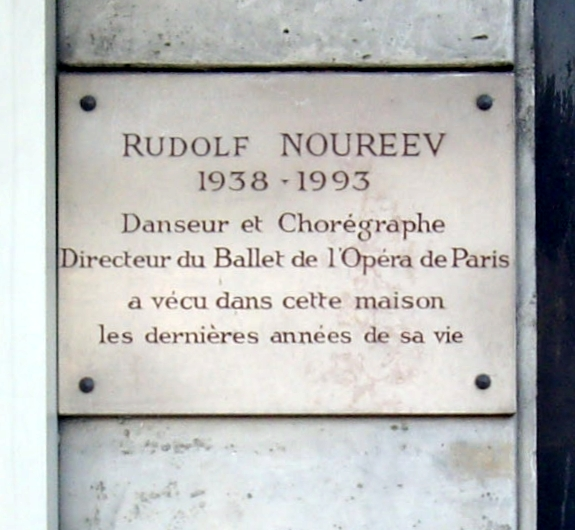 Plaque apposée au n° 23 du quai Voltaire, Paris 7e, où le danseur et chorégraphe Rudolf Noureev (1938-1993) passa les dernières années de sa vie.